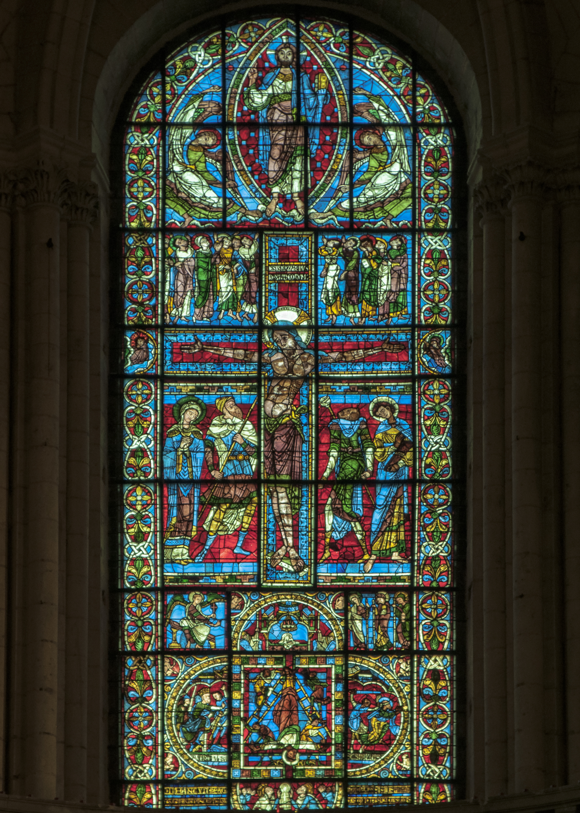 Visible au-dessus de l'autel majeur, le vitrail de la Crucifixion date du XIIe siècle.